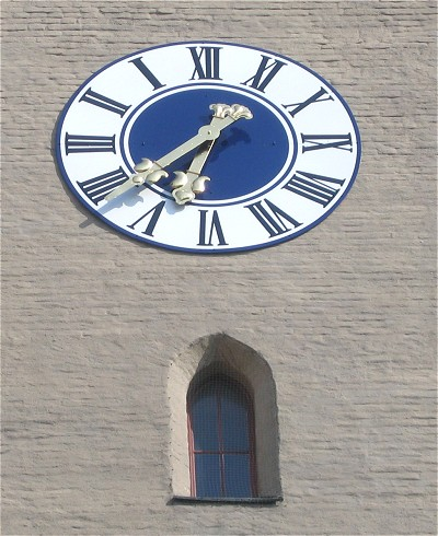 Uhr am Isartor in Muenchen